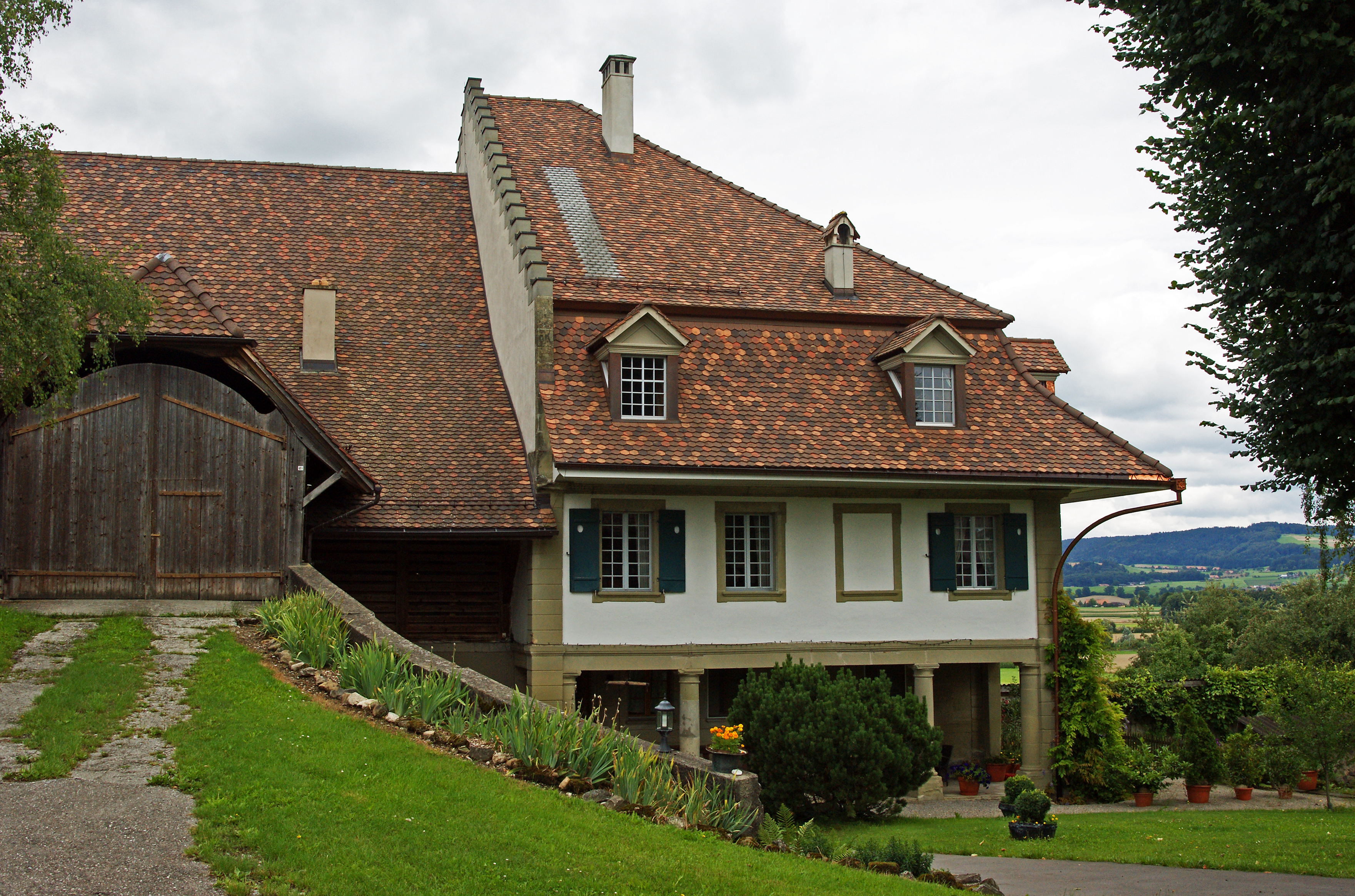 Herrenbauernhaus Alter Sandacher, Allmendingen bei Bern, von der Seite